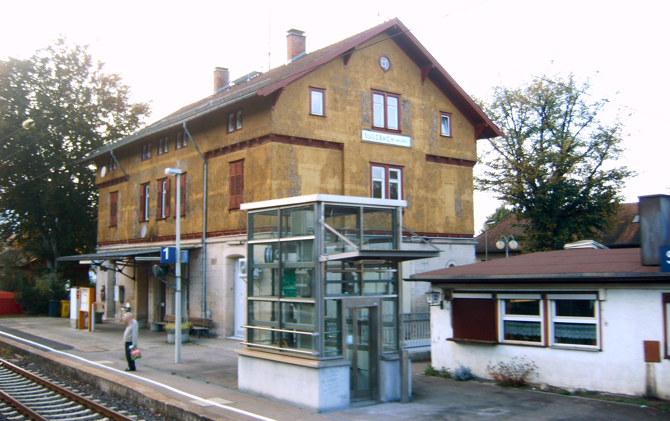 Bahnhof Sulzbach (Murr)